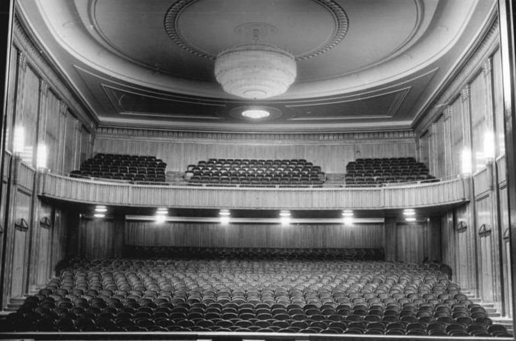 Leipzig, Schauspielhaus, Zuschauerraum Zentralbild Wallmüller 3.6.1959 Das Schauspielhaus in Leipzig UBz: Blick in den Zuschauerraum. URHEBERRECHT: STÄDT.THEATER LEIPZIG Reproduktion Überweisung auf KontoNr. 5330620 der Deutschen Notenbank Leipzig Das Honorar ist ohne Steuerabzug zu überweisen Foto: Helga Wallmüller